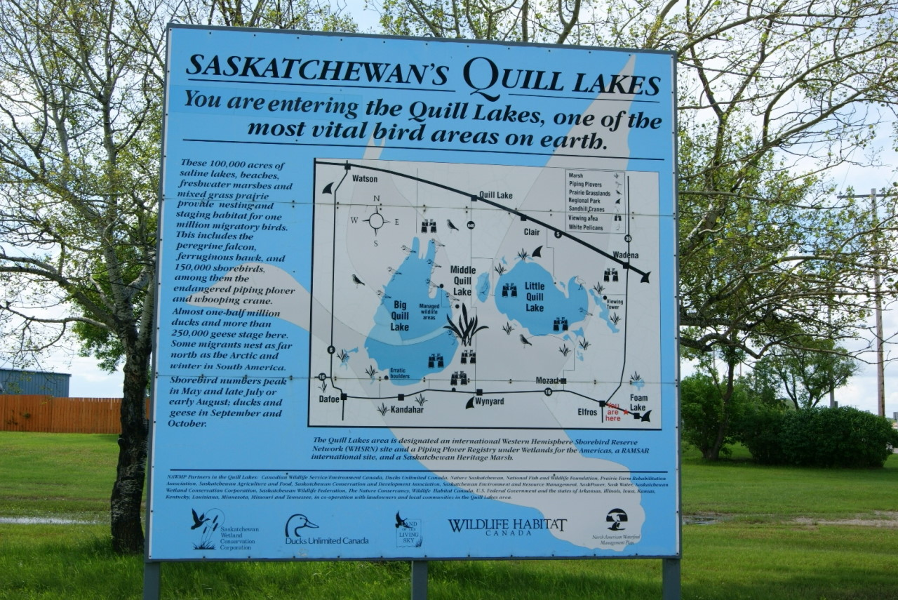 Qaraqalpaqsha: Quill Lakes sign in Foam Lake